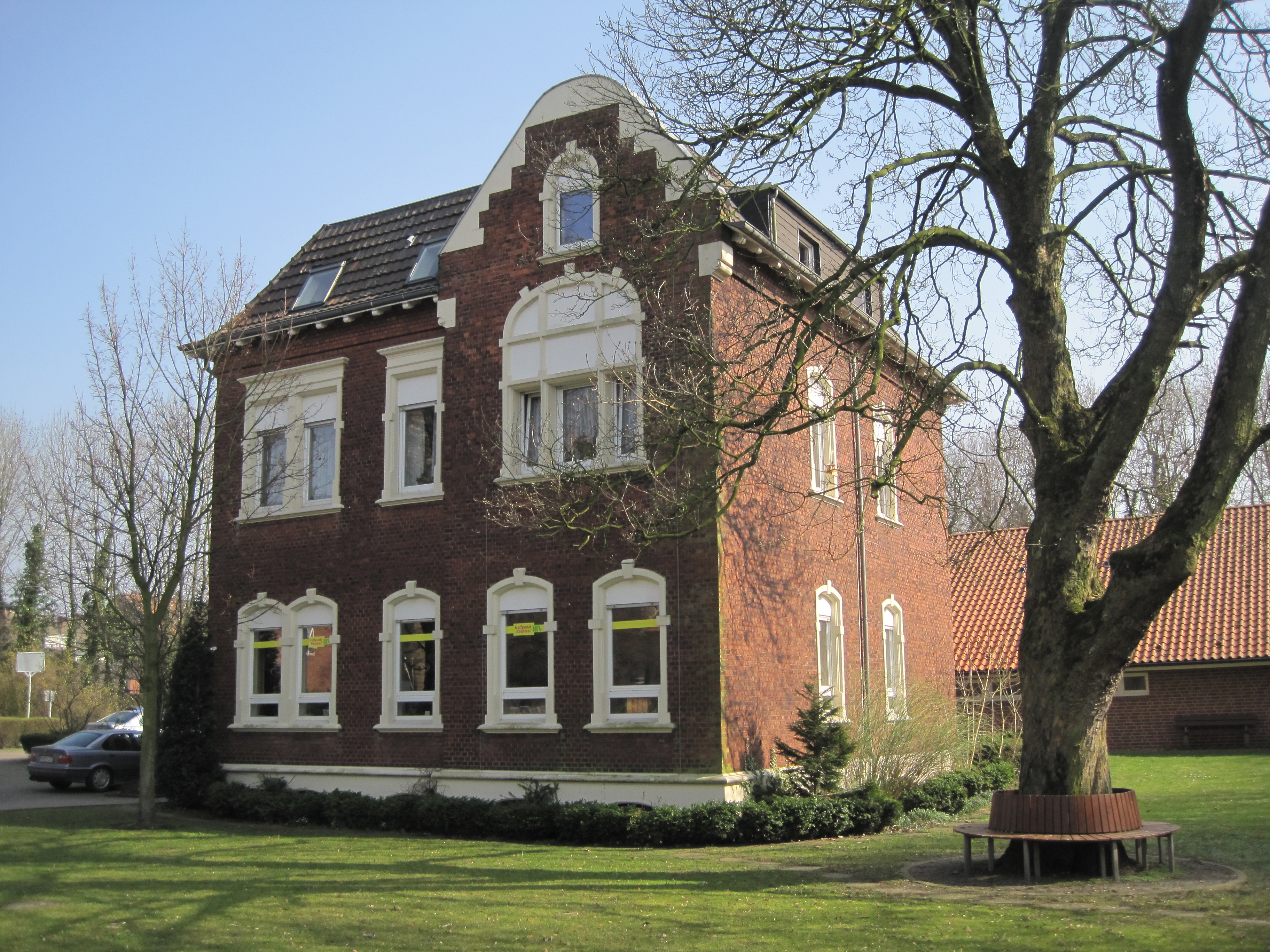 Das Foto zeigt die Bücherei (Altentagesstätte) an der St. Stephanus-Kirche in Hamm-Bockum-Hövel.